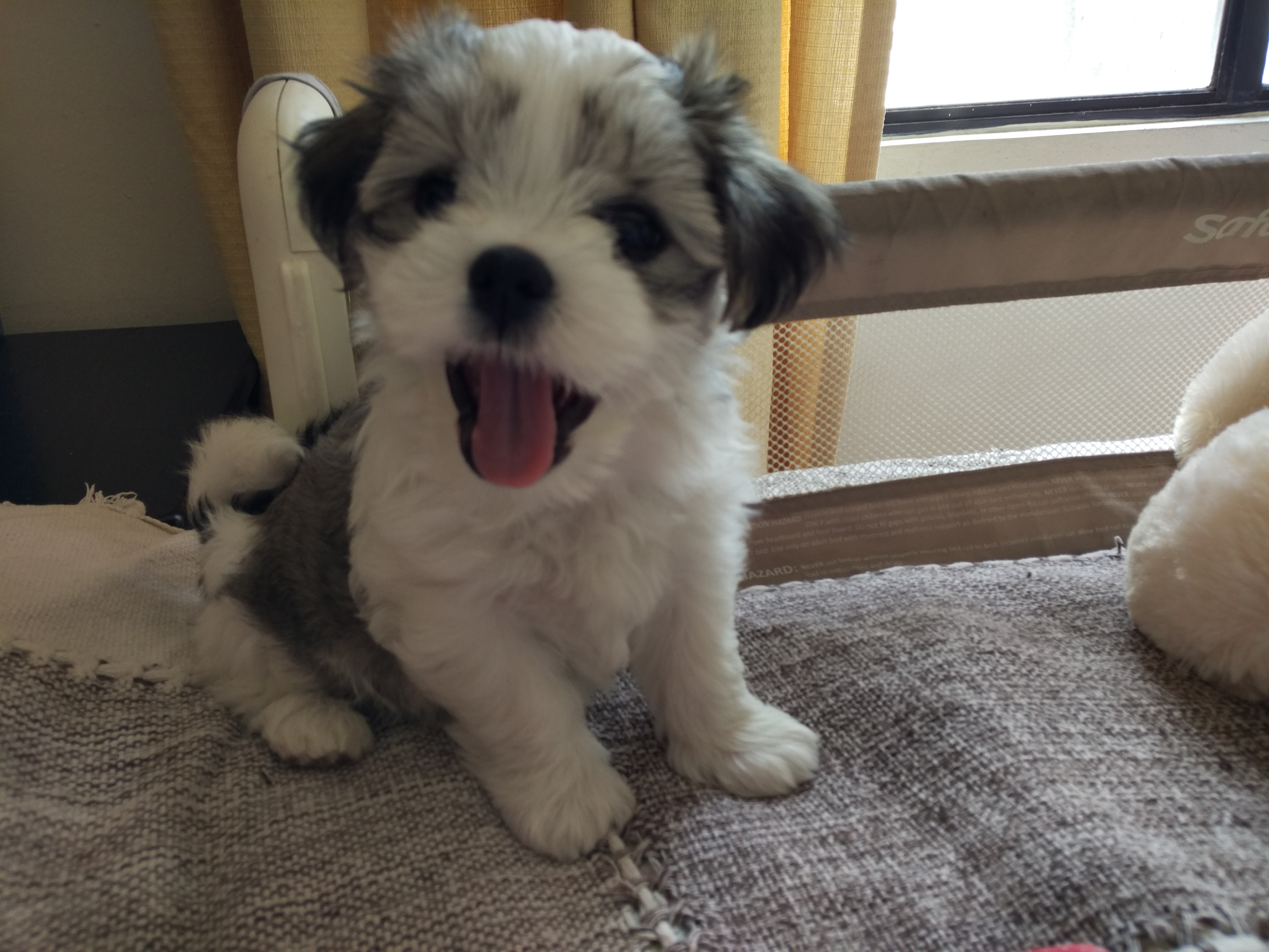 Mal-shi Cachorro un mes.